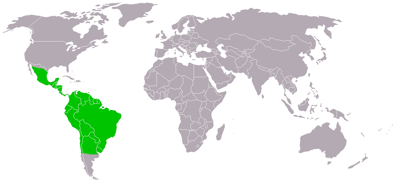 Gemeine Vampir (Desmodus rotundus) Vampire bat Source: self made